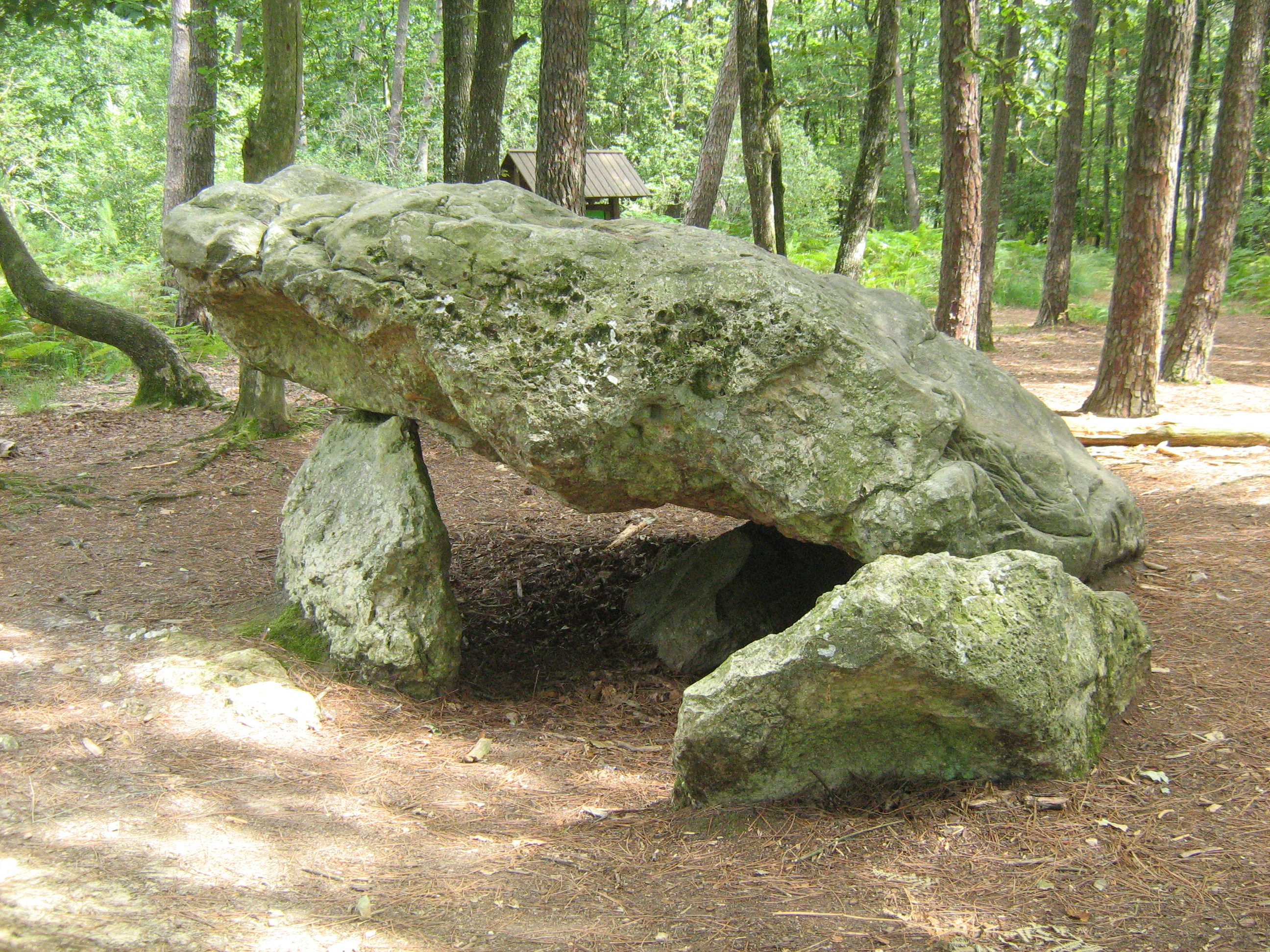 Dolmen de la Pierre Procureuse à Saint-Cyr-la-Rosière, Orne (FRANCE). .